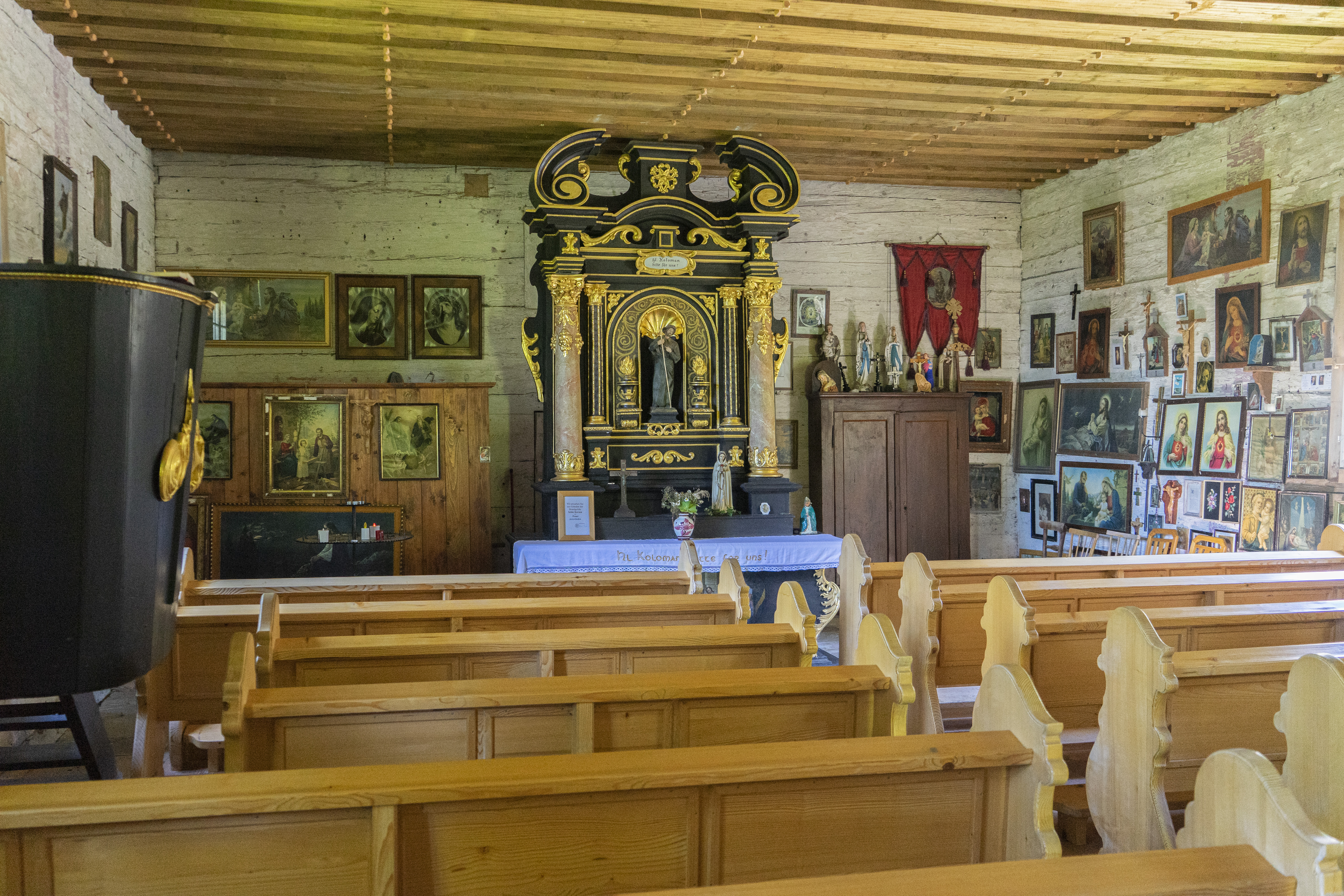 Kirche St. Koloman, Kolomansberg, Oberösterreich, Innenansicht